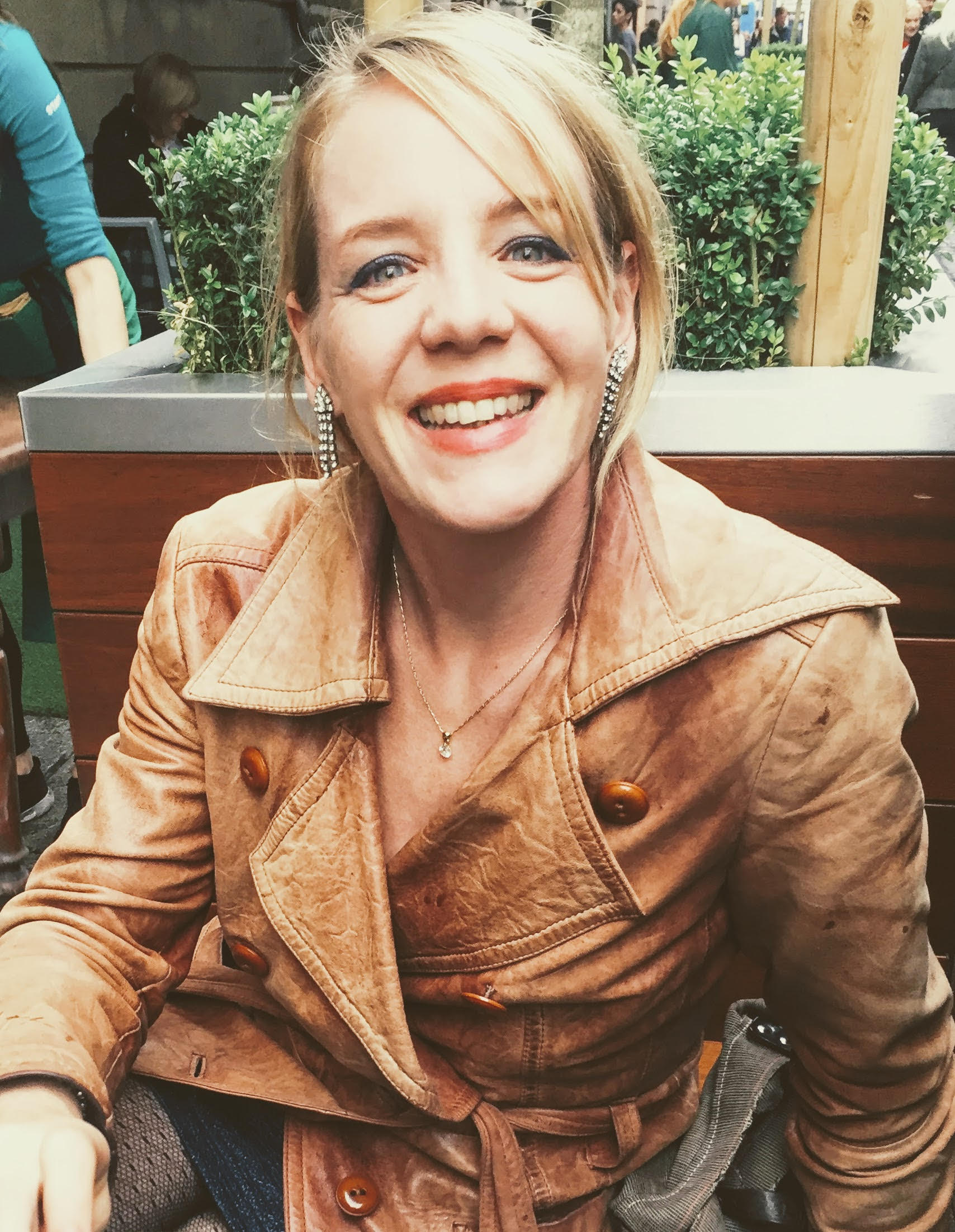 Katrin Wichman 2017